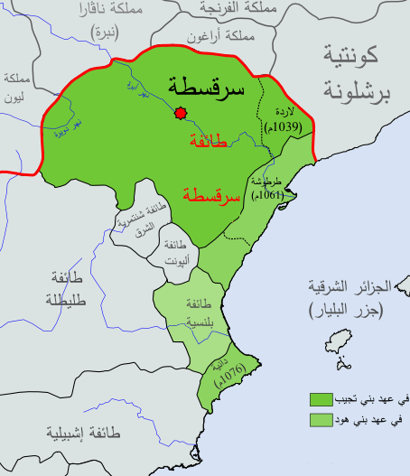 توسّع طائفة سرقسطة الأندلسيَّة خلال القرن الحادي عشر الميلاديّ.